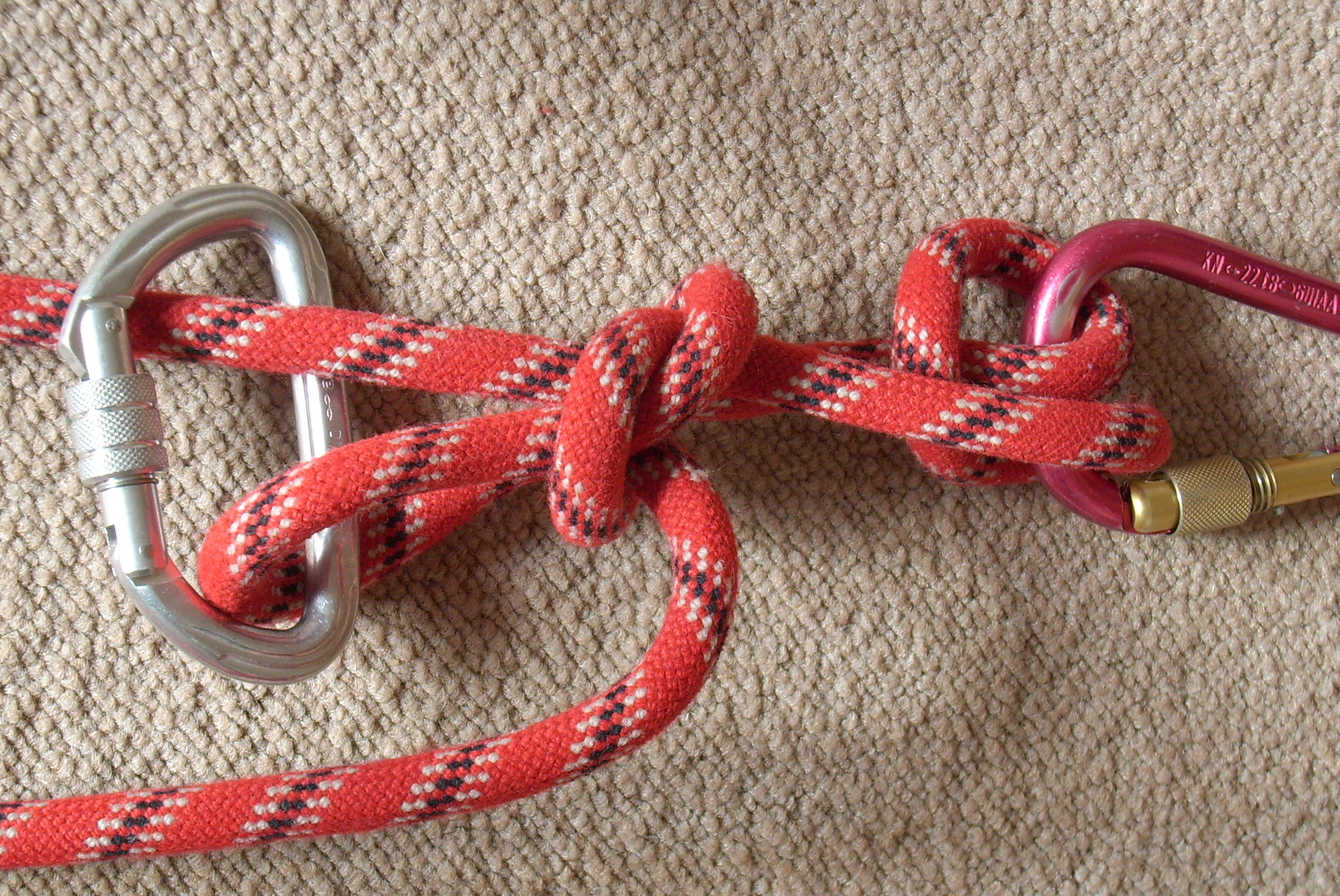 Schleifknoten, gesichert mit Karbiner